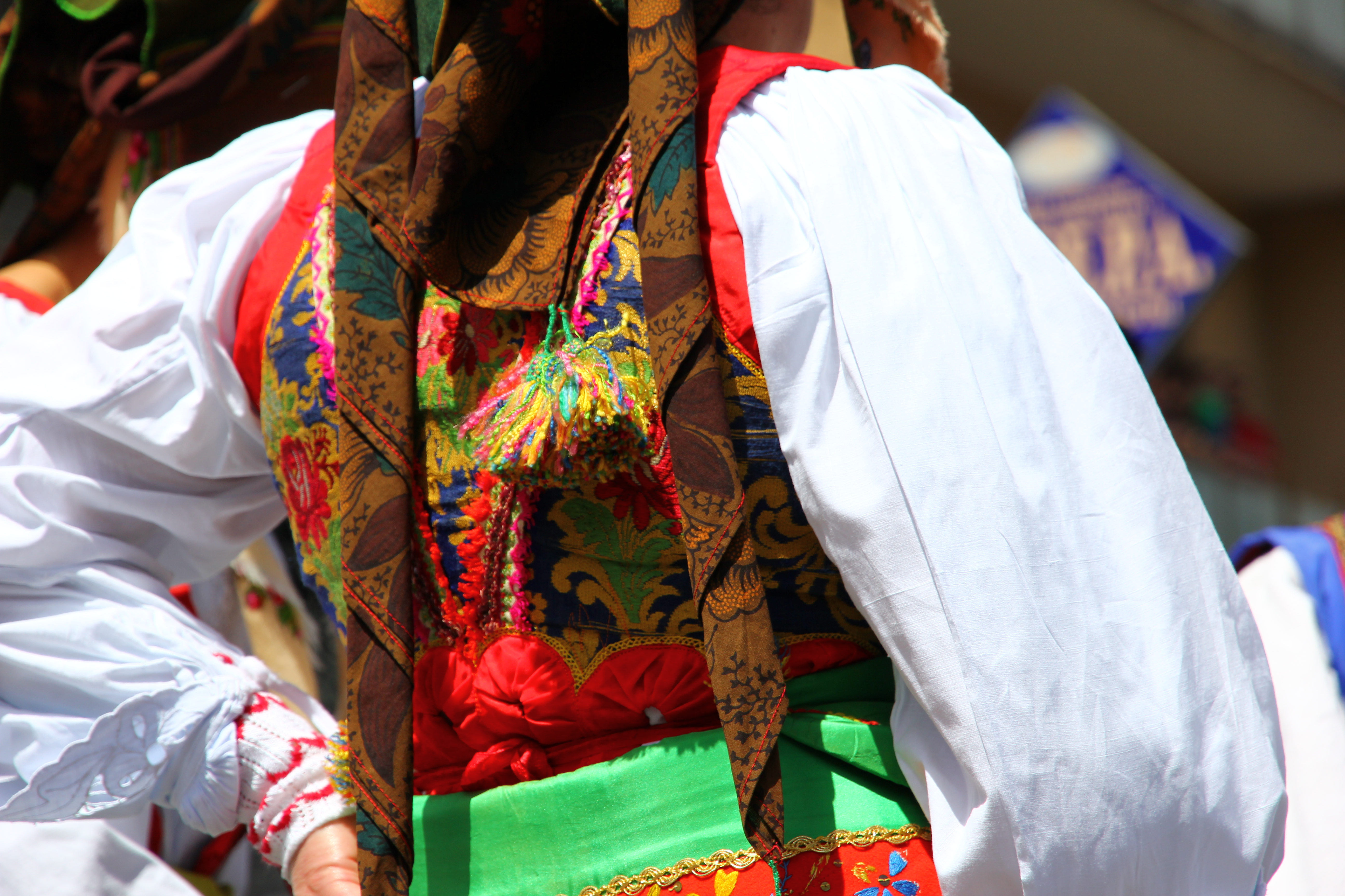 Cavalcata Sarda 2013 (Sassari)